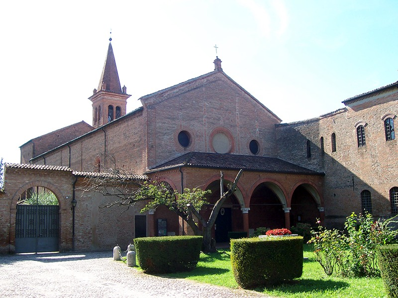 Ferrara - Monastero di S. Antonio in Polesine